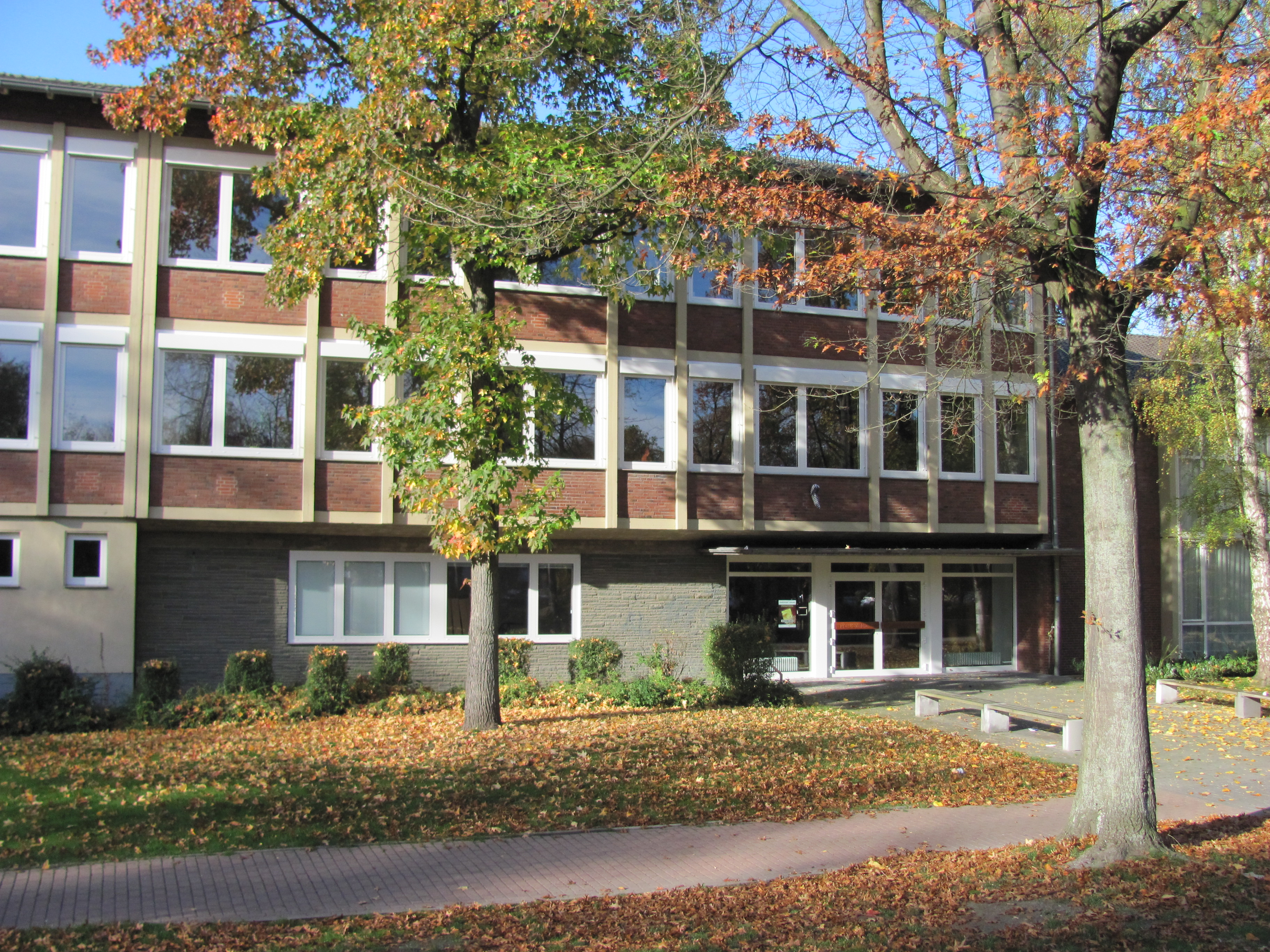 Städtisches Gymnasium Ahlen, Osteingang des Altbaus